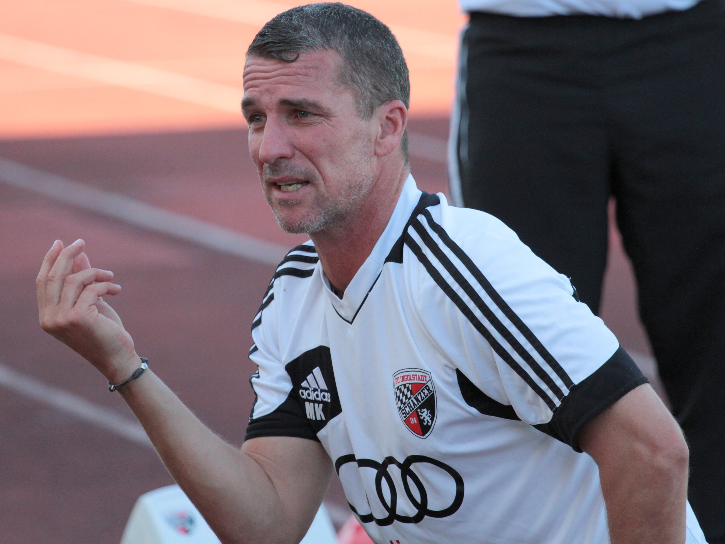 Marco Kurz als Trainer des FC Ingolstadt